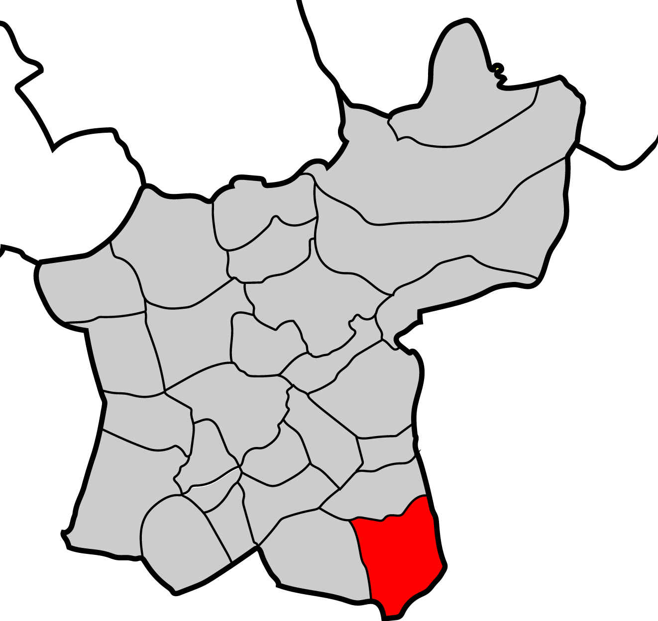 Mapa parroquia de Lexo Baralla